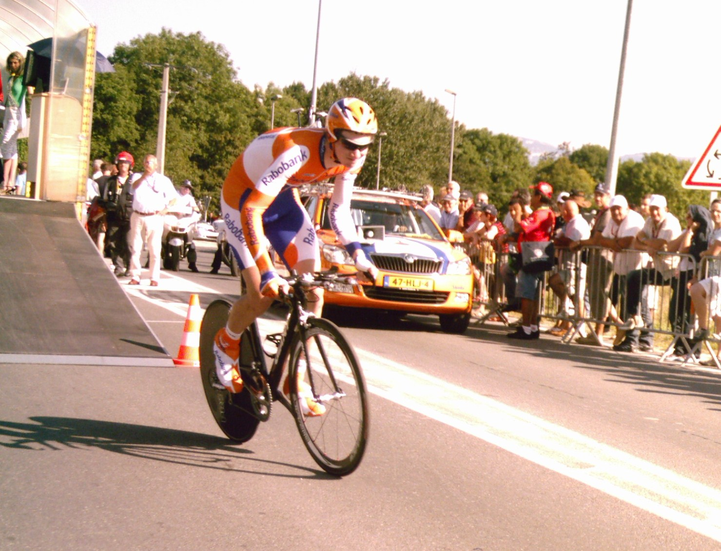 Mats Boeve au départ du contre-la-montre de la troisième étape b du Tour de l'Ain 2009